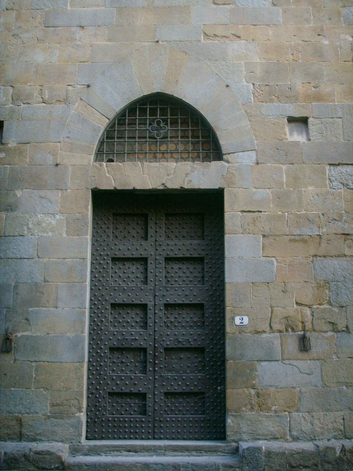 Porta del Palazzo del Bargello a Firenze. Florence, Italy